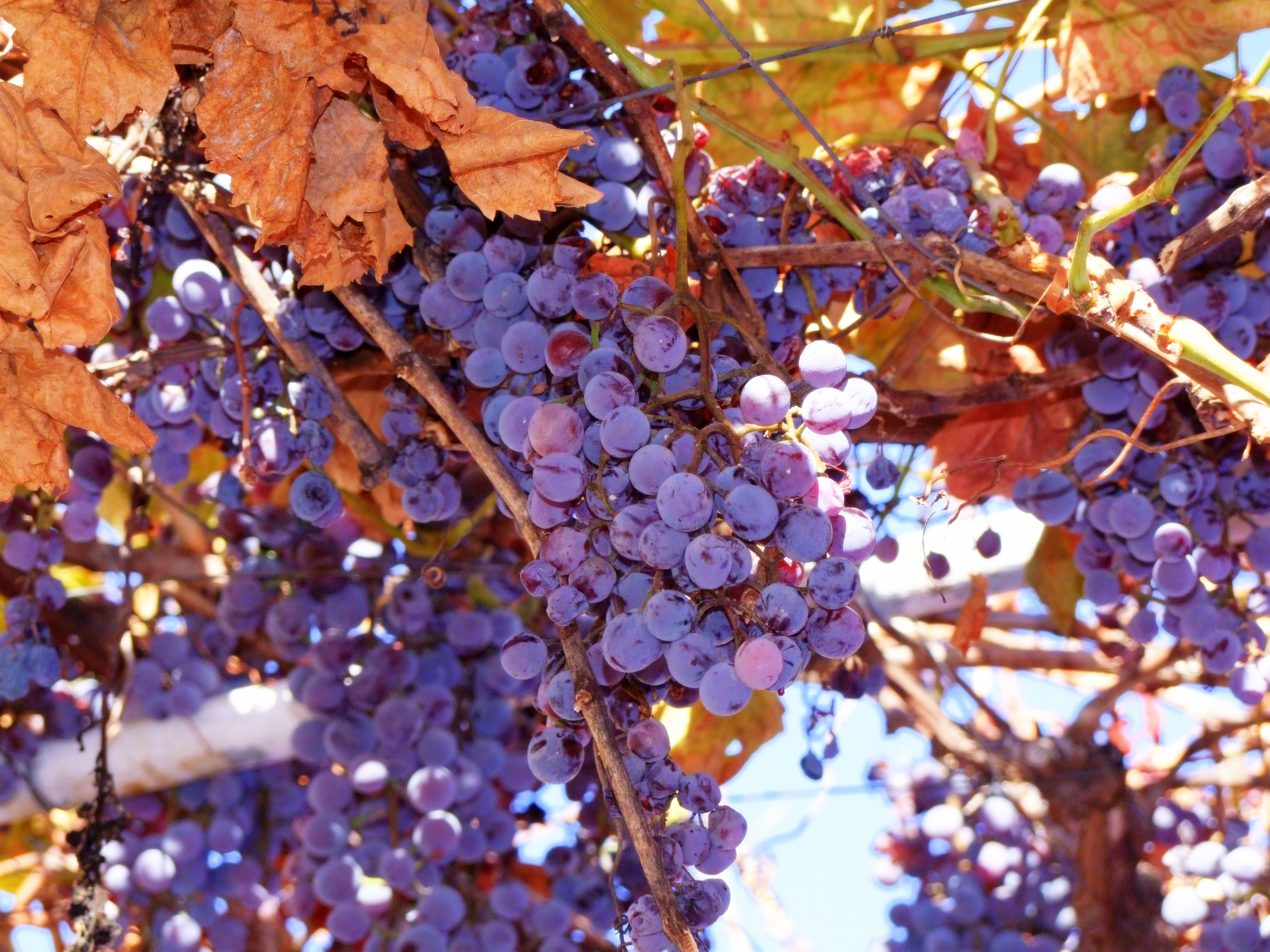 Vitis labrucsa grape Concord